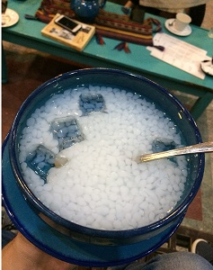 پالوده کرمانی